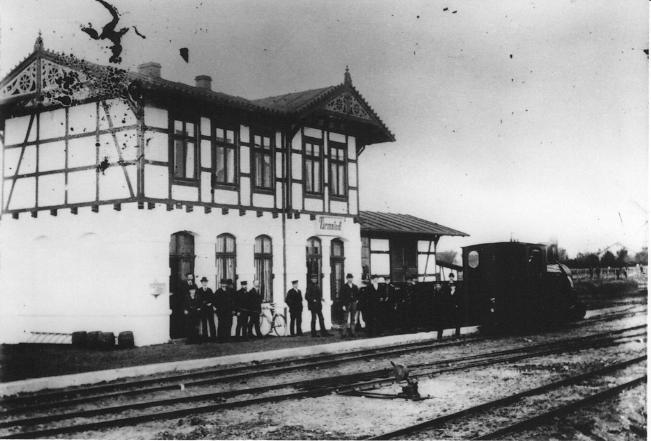 Bahnhof Tarmstedt der Kleinbahn Bremen- Tarmstedt "Jan Reiners"